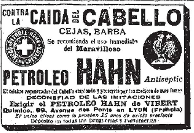 Petroleo Hahn inserzione del 30.8.1909 su El Liberal di Madsrid - contra la caida del cabello cejas, barba, se recomienda el uso immediato del Maravilloso Petroleum Hahn antispetic